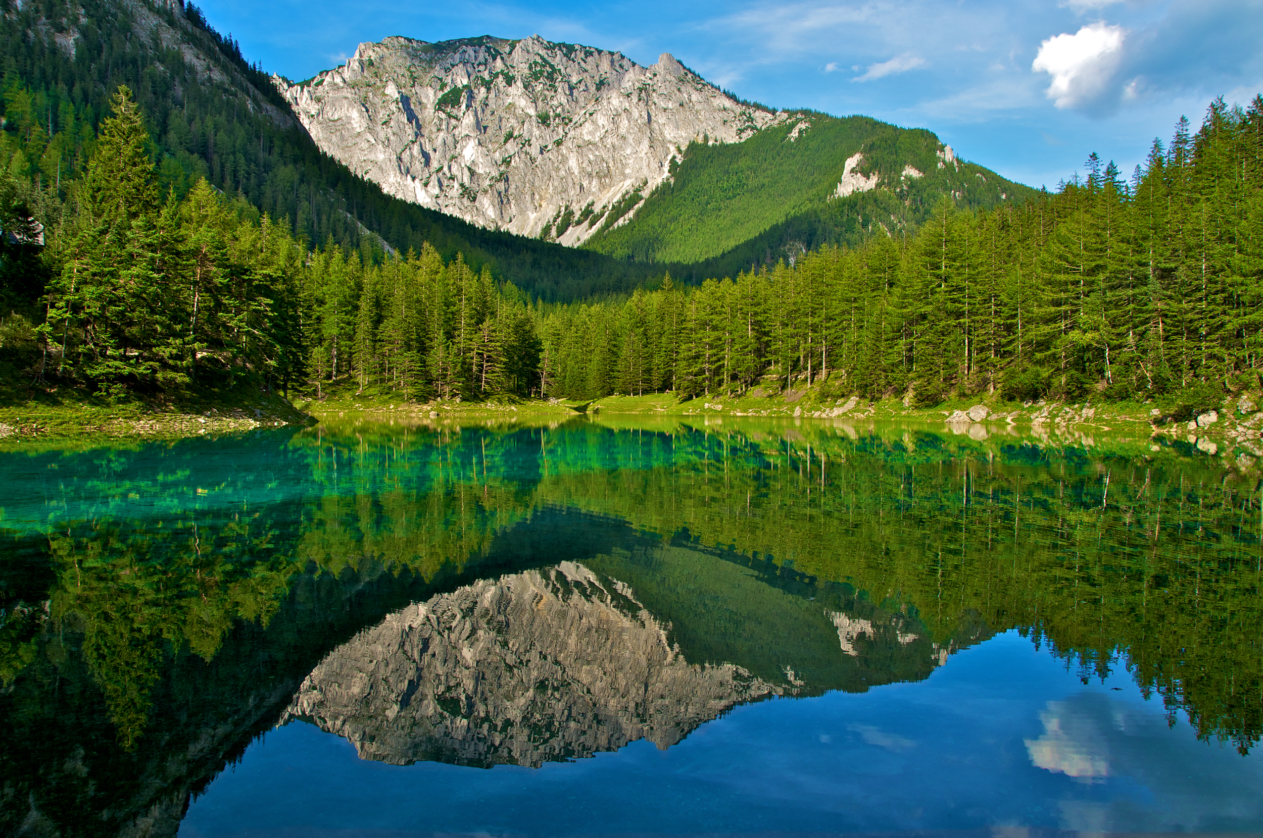 Grüner See This media shows the nature reserve in Styria with the ID NSG 19 a.